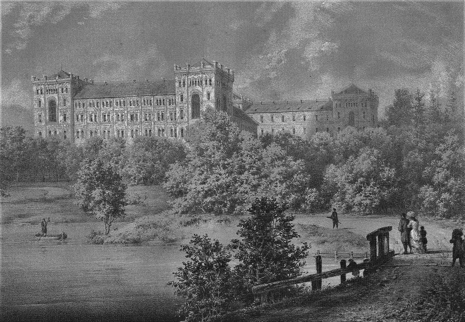 Zaklad, rys. Napoleon Orda